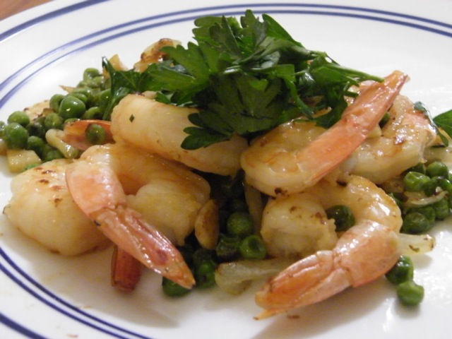 שרימפס ברוטב חמאה ושום עם רפונה - צלחת הגשה